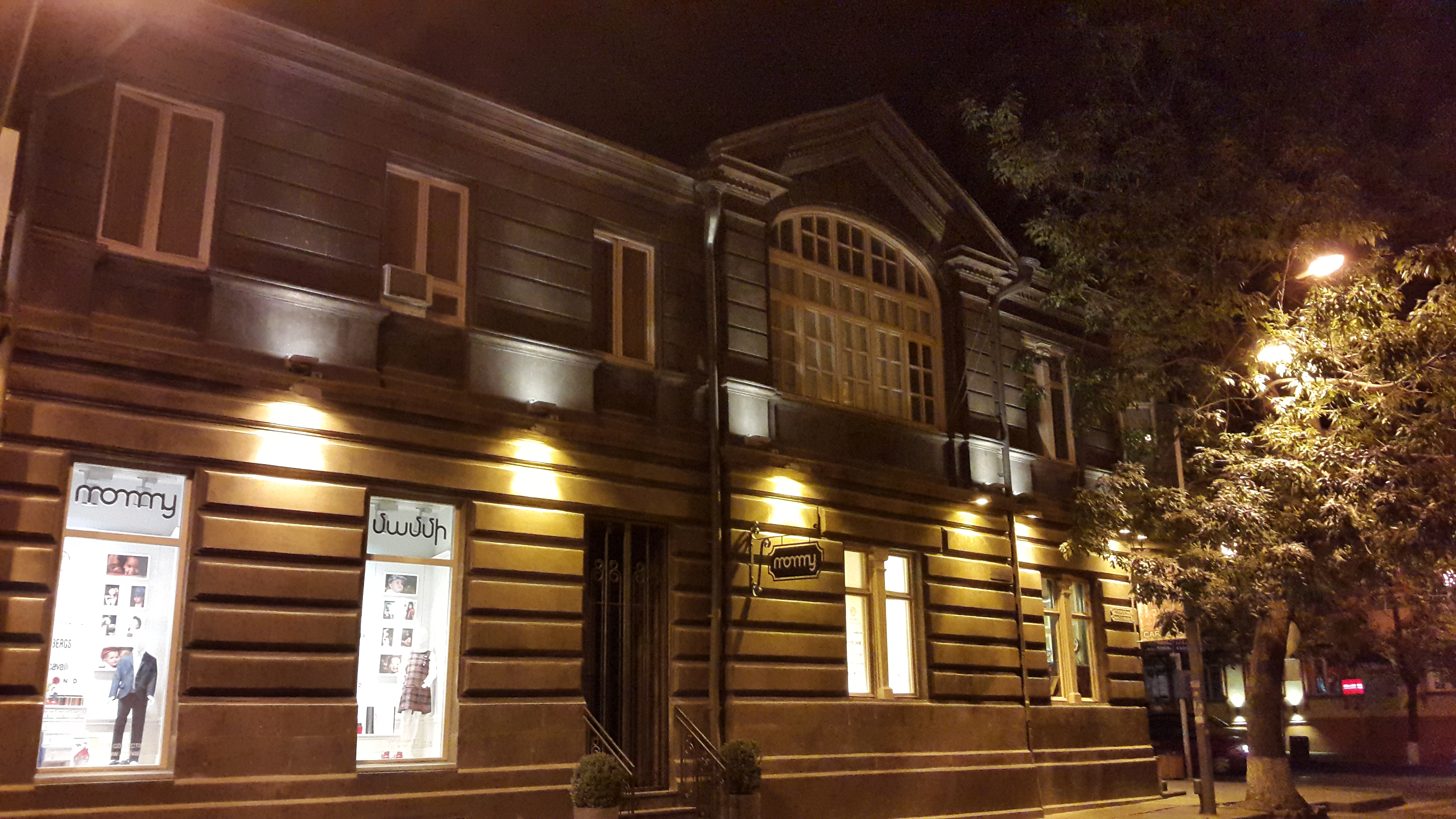 Բնակելի տուն Եգոր Խանզադյանի 6/178.4.4